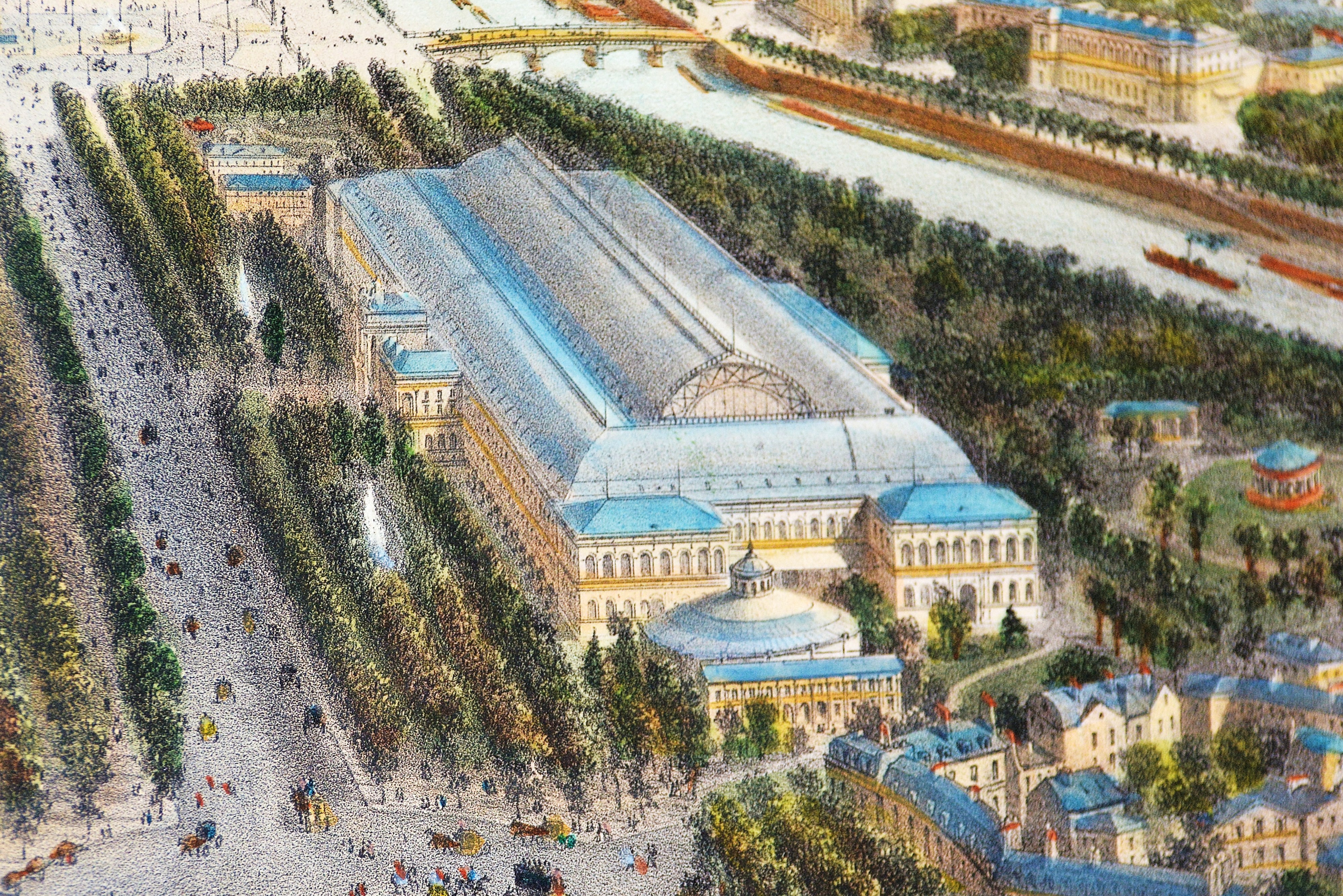 Détail de la gravure "Paris en 1860. Vue à vol d'oiseau, prise au-dessus du rond-point des Champs-Elysées" représentant le Palais de l'Industrie. La gravure est issue de "Paris dans sa splendeur".